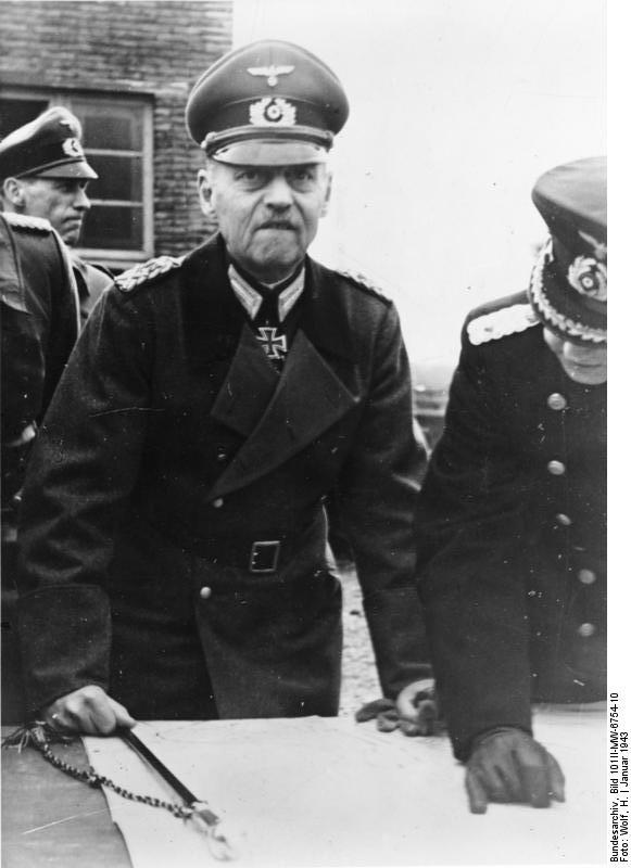 In einem Hafenpunkt an der Kanalküste. Generalfeldmarschall von Rundstedt läßt sich von den Hafenkommandanten die Befestigungslagen und das Verteidigungssystem erklären. 945-43 "Fr" OKW Jan.43 Text: Scherl